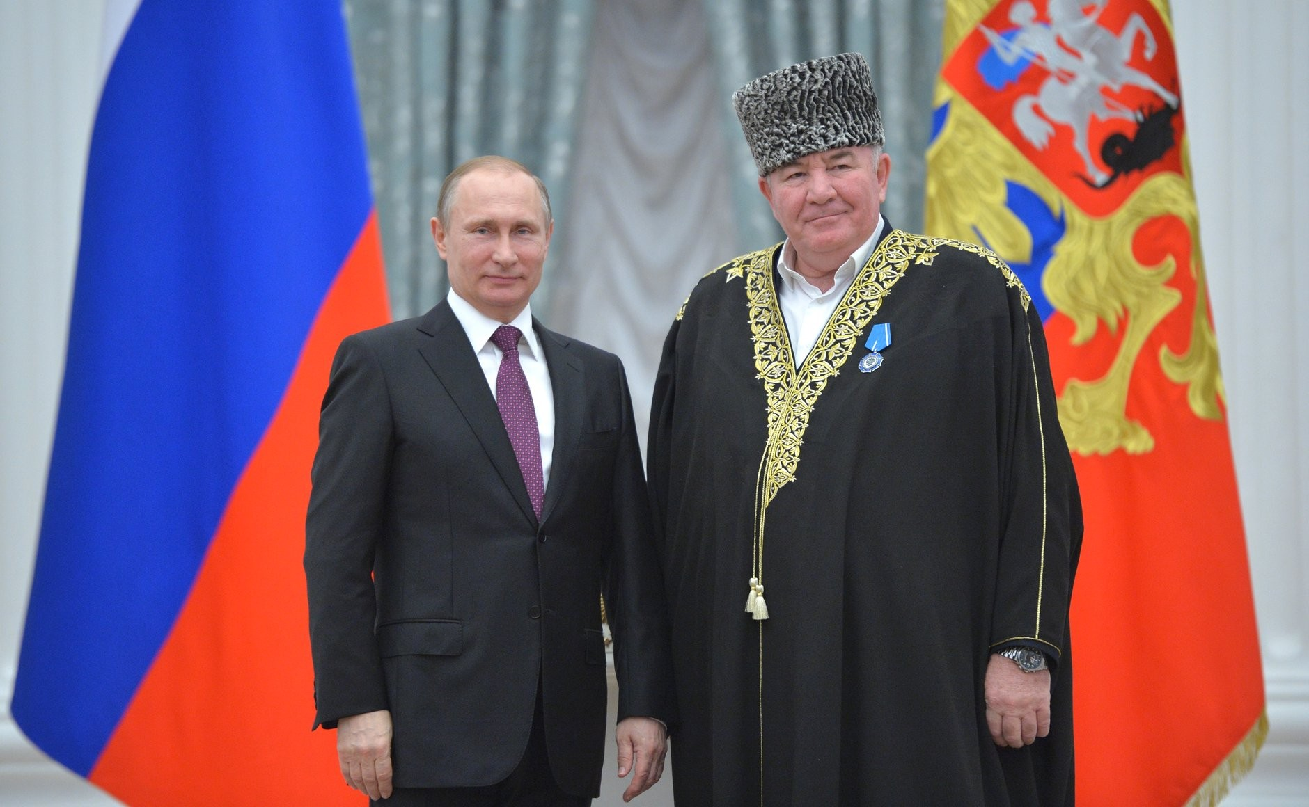 Церемония вручения государственных наград Российской Федерации. Орденом Почёта награждён муфтий, председатель президиума организации «Духовное управление мусульман Карачаево-Черкесской Республики» Исмаил Бердиев